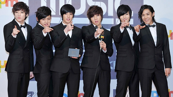 유키스. 2011년 2월, MTV-DAUM 뮤직 페스트에서.